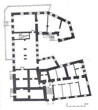 План Малога гасцінага двара